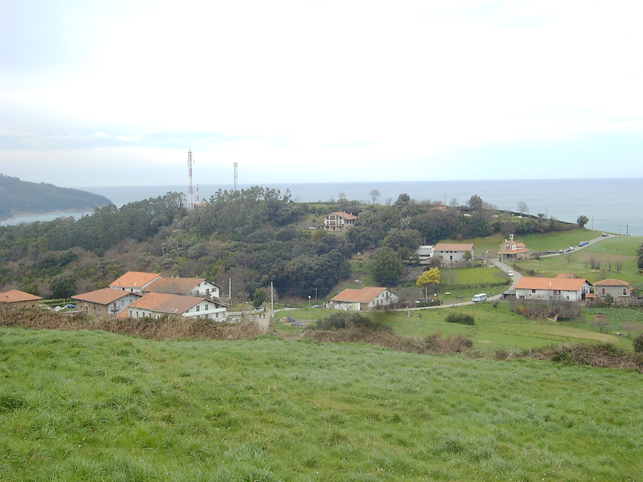 Demiku auzoa, Bermeon.